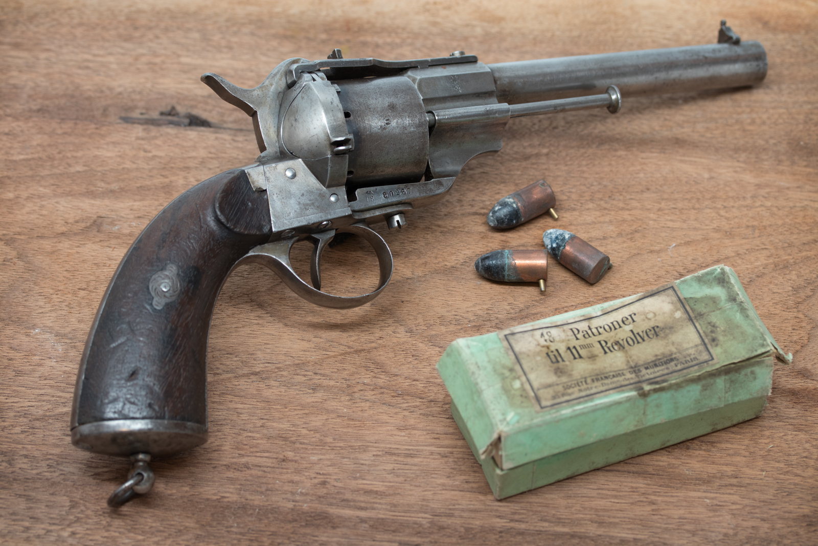 Norwegian M/64/98 Lefaucheux Pinfire Revolver with Military Cartridge Box